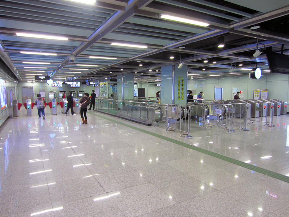 東湖站站廳